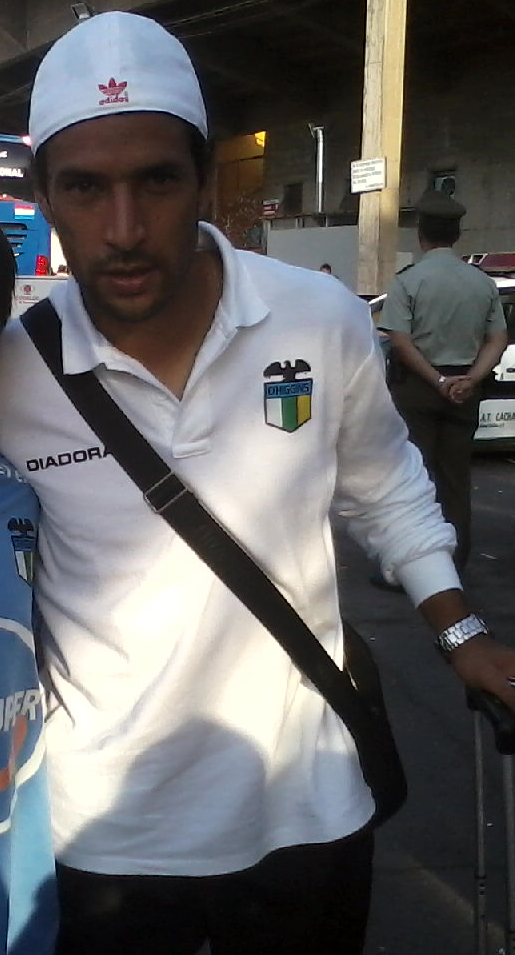 Luis Pedro Figueroa, jugador profesional de fútbol.